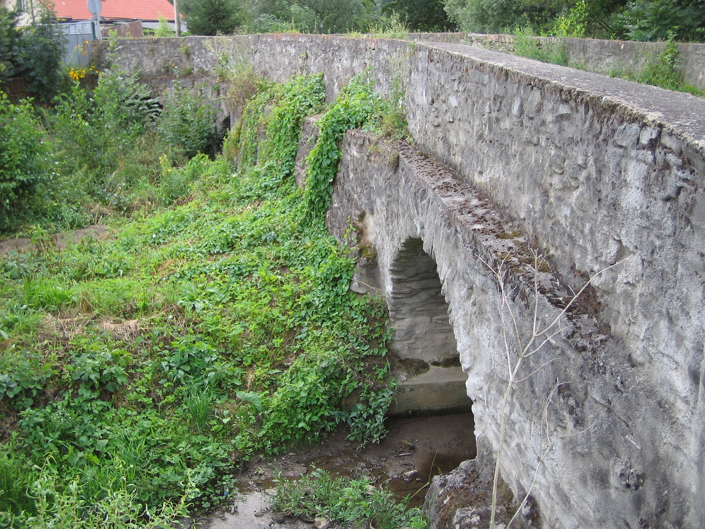 Historický kamenný most přes Hostačovku v Kamenných Mostech, okr. Kutná Hora